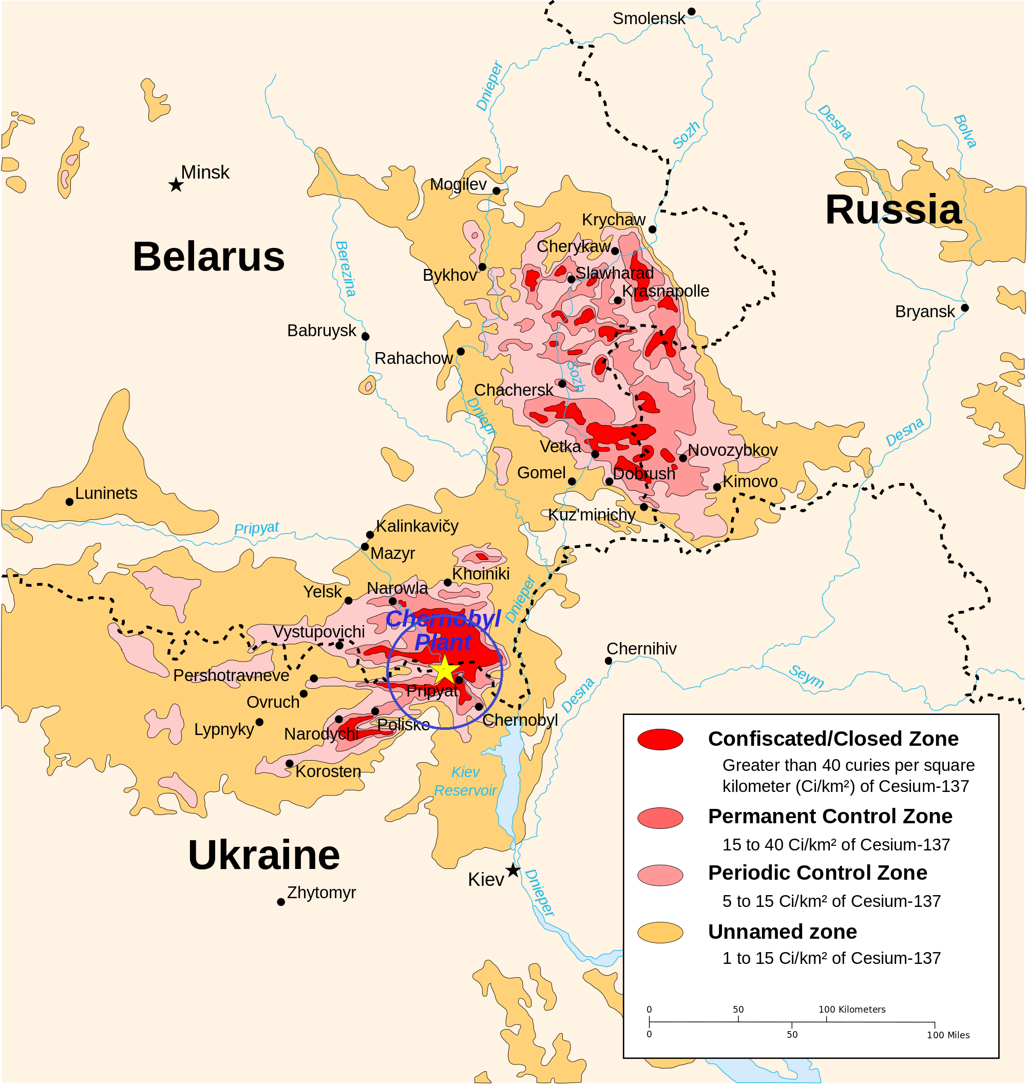 に、30km圏を示す円を描画、再構成しました。